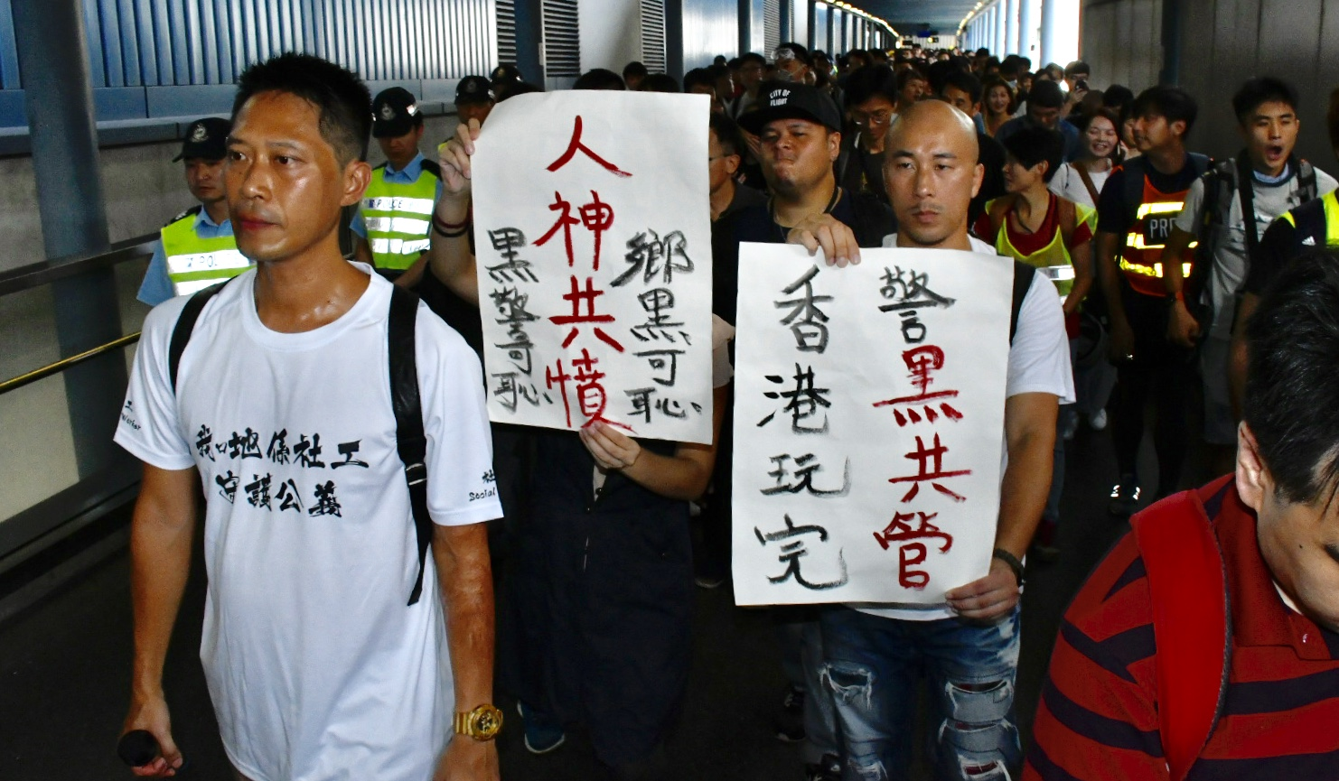 中文（中国大陆）: 約600名社工及市民7月22日遊行到元朗警署，就7月21日晚元朗西鐵站暴力襲擊途人事件報案。